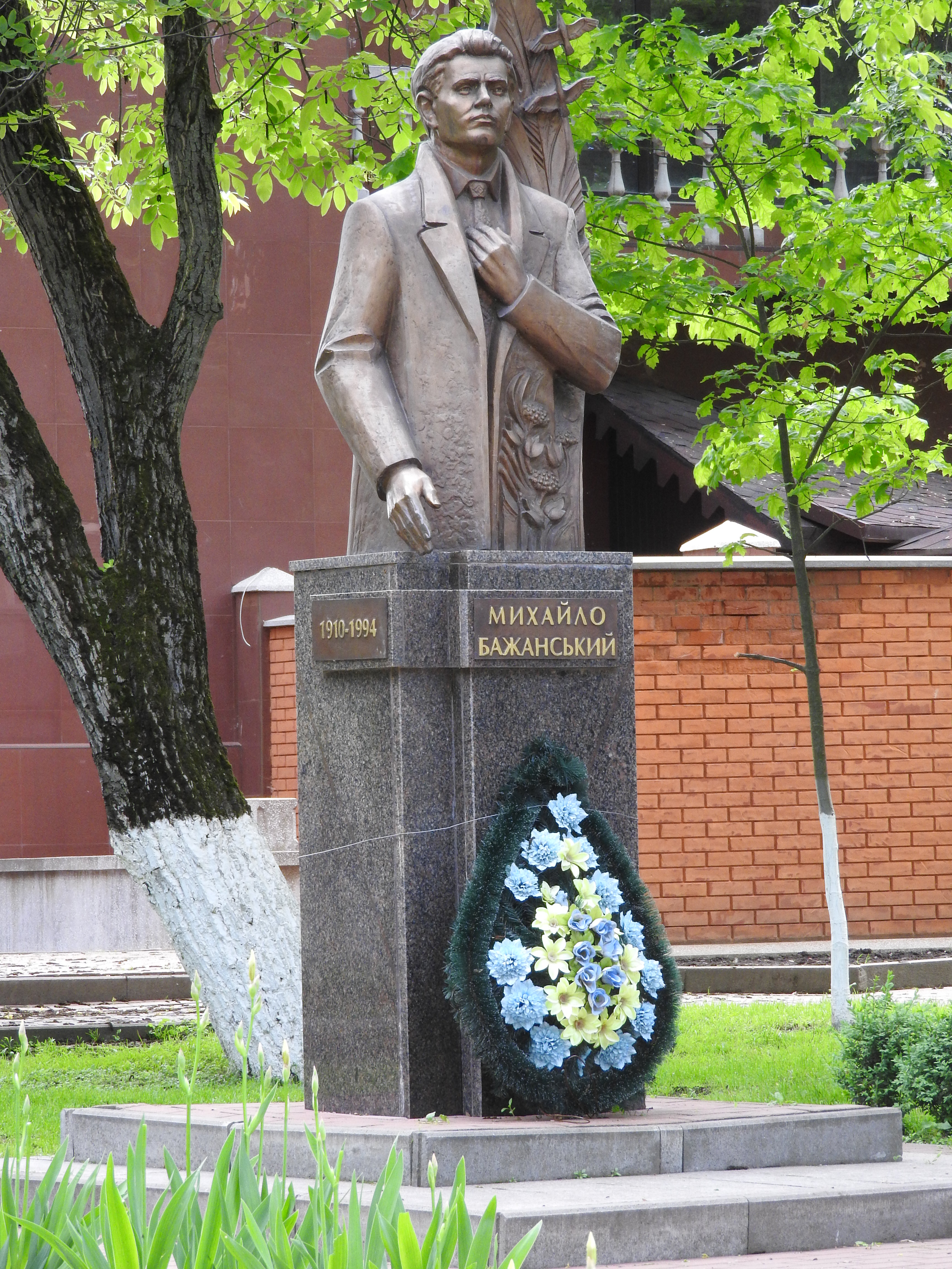 Denkmal in Sniatyn, Ukraine